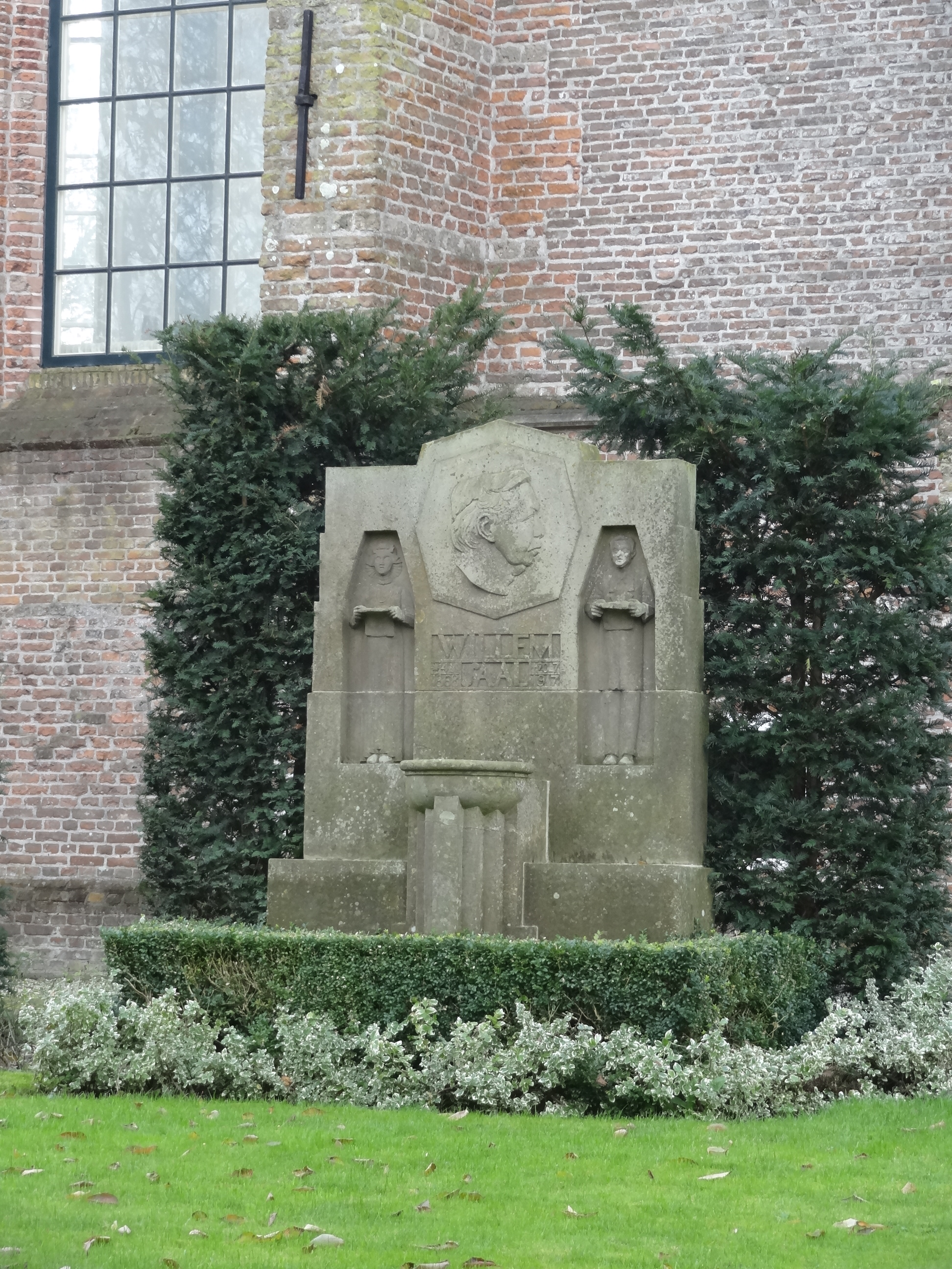 Monument voor Willem Saal naast de Hervormde Kerk van Wognum. Portret toont Willem Saal en profiel geflankeerd door een man en een vrouw.